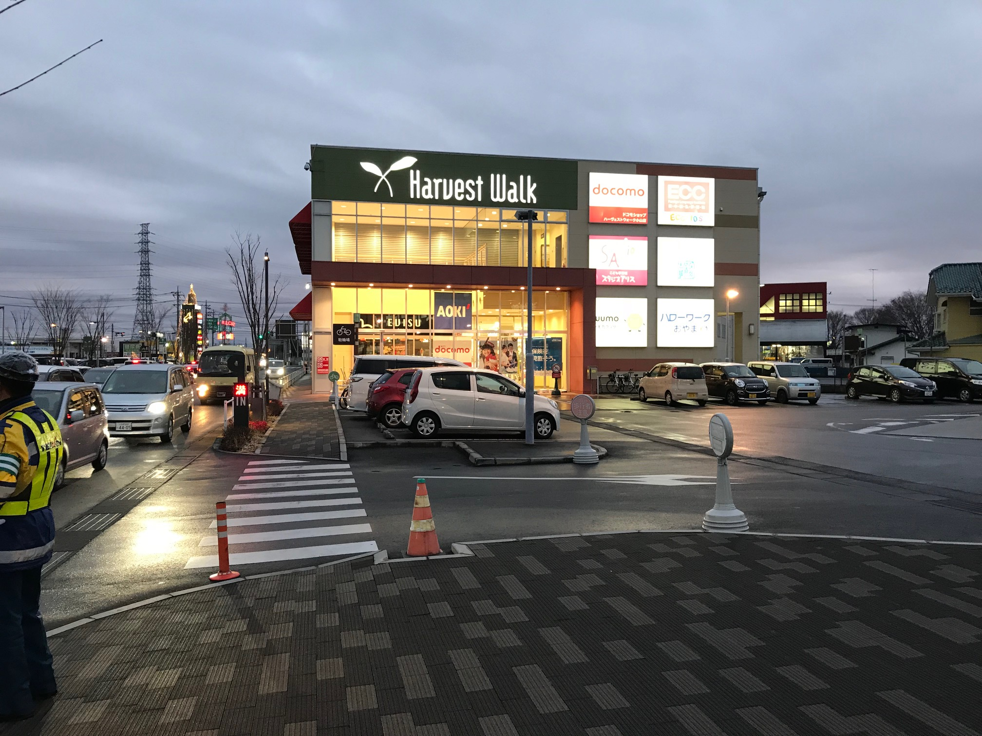 おやまゆうえんハーヴェストウォーク